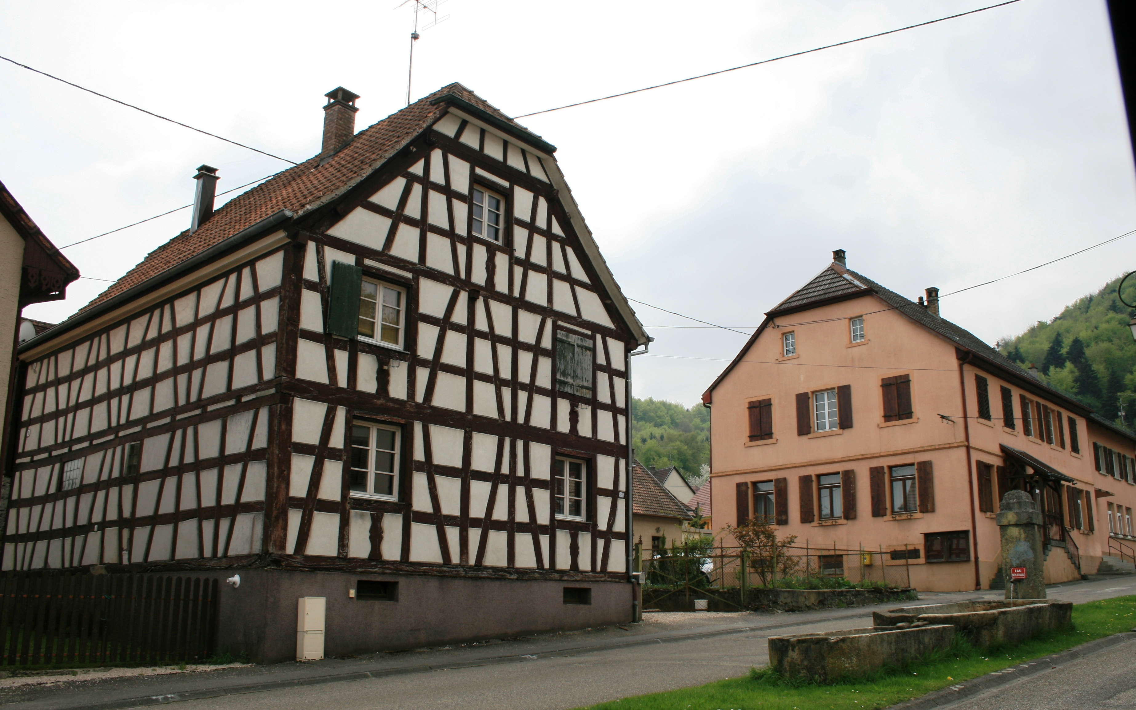 Vieux Ferrette, Alsace